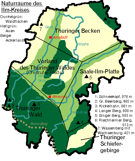 Die Naturräume des Ilm-Kreis in Thüringen.